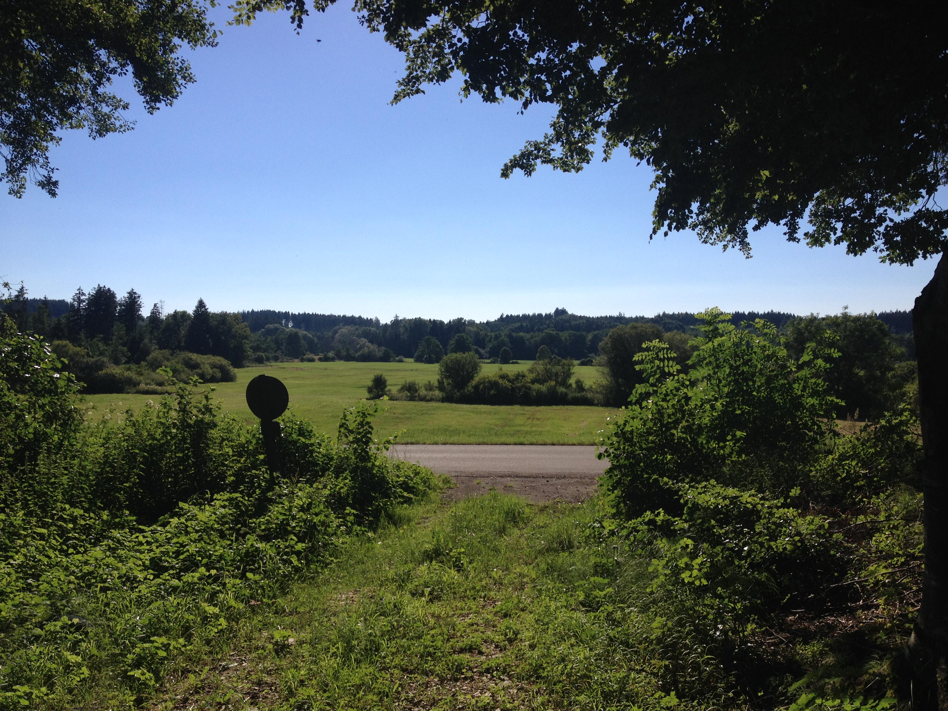 Landschaft im FFH-Gebiet Westliche Günz